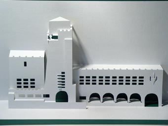 Ontwerp, uitvoering en fotografie van eigen hand. (Louis Hartlooper Complex in Utrecht)